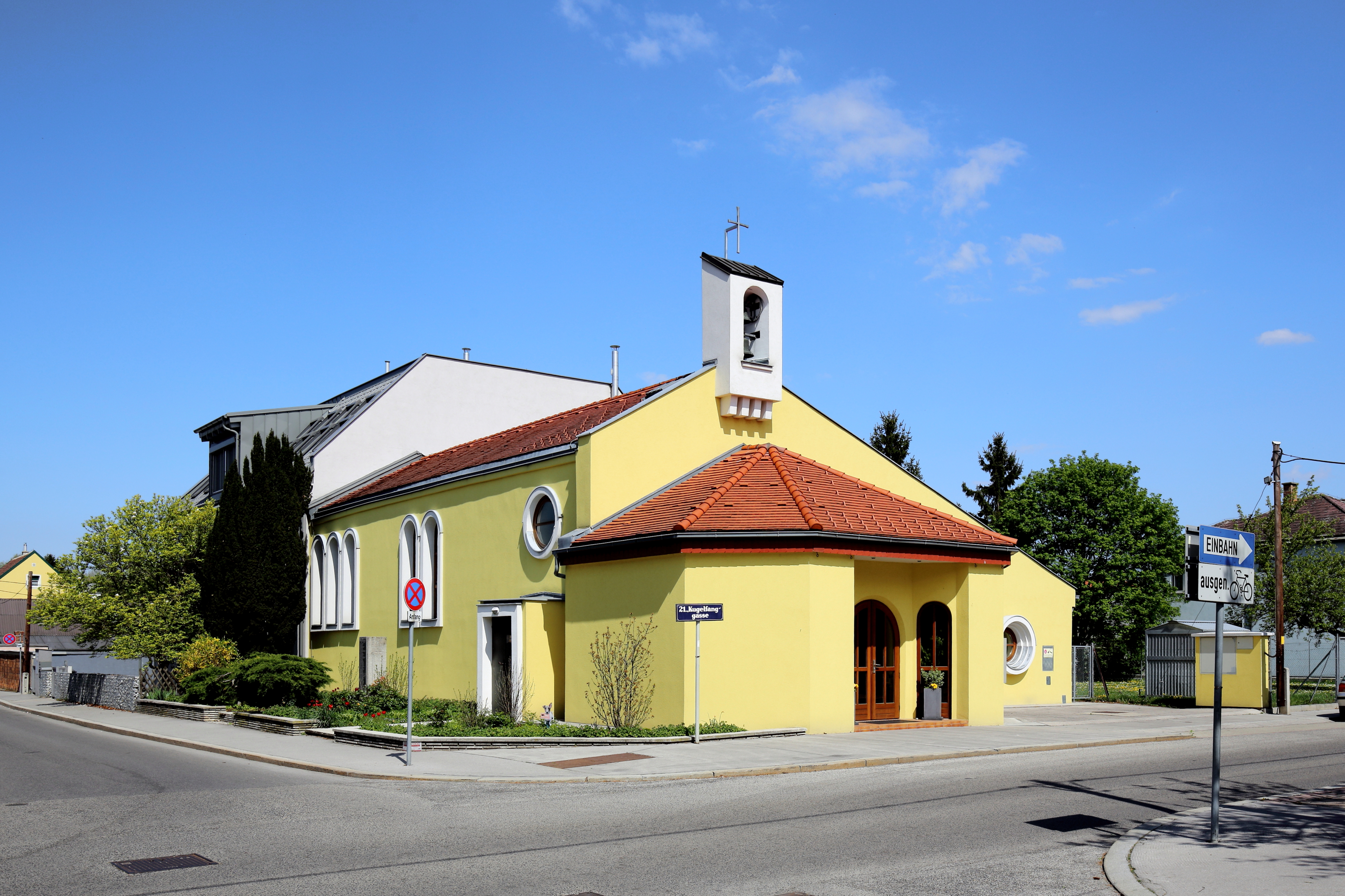 Die katholische Pfarrkirche St. Elisabeth in Bruckhaufen, ein Ortsteil im 21. Wiener Gemeindebezirk Floridsdorf.